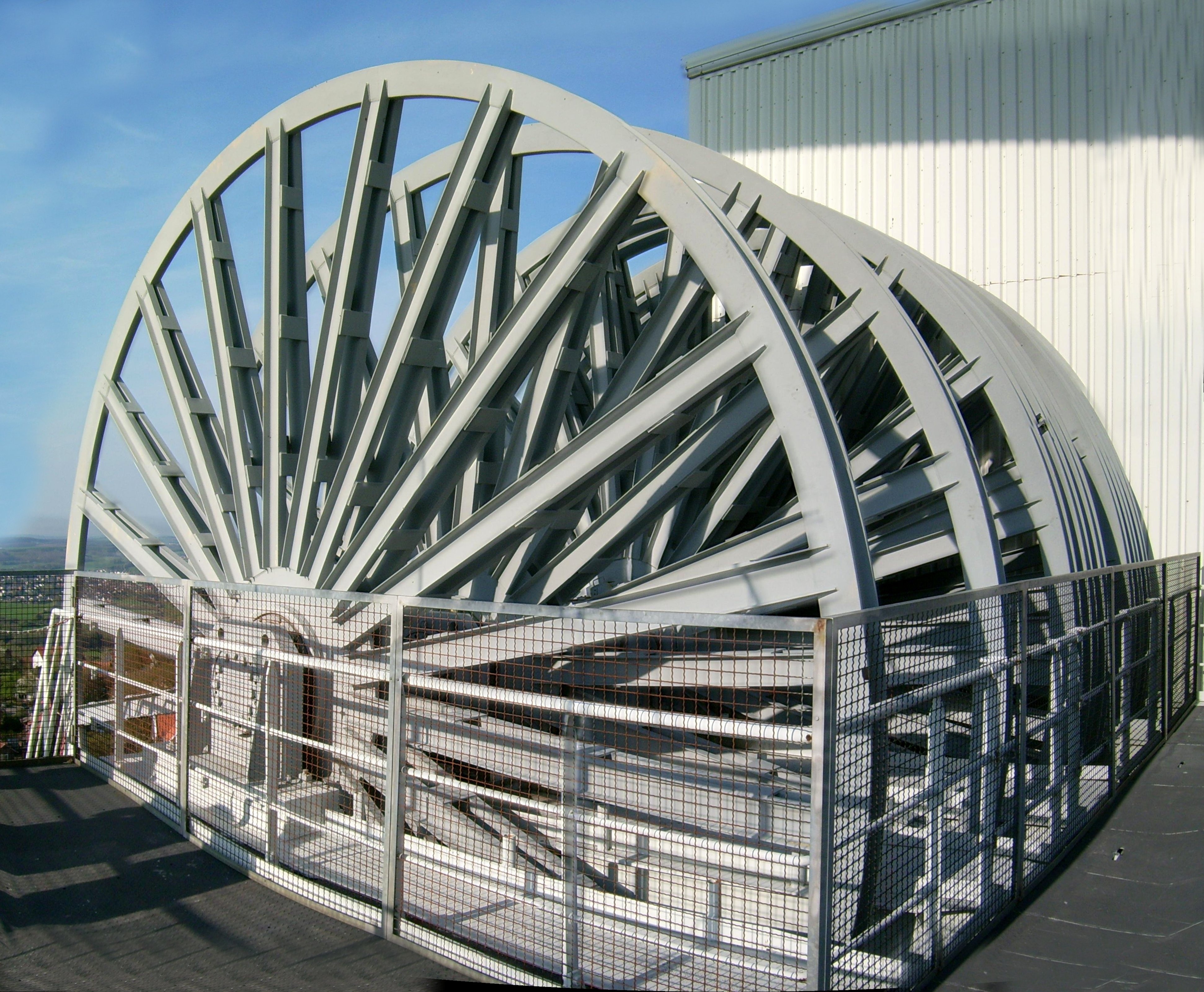 Seilscheiben des größten Fördergerüstes Europas über Schacht 4 der Grube Göttelborn, Deutschland. Im Vordergrund die beiden Seilscheiben der Einseil-Nebenförderanlage, im Hintergrund die sechs Seilscheiben der Dreiseil-Hauptförderung